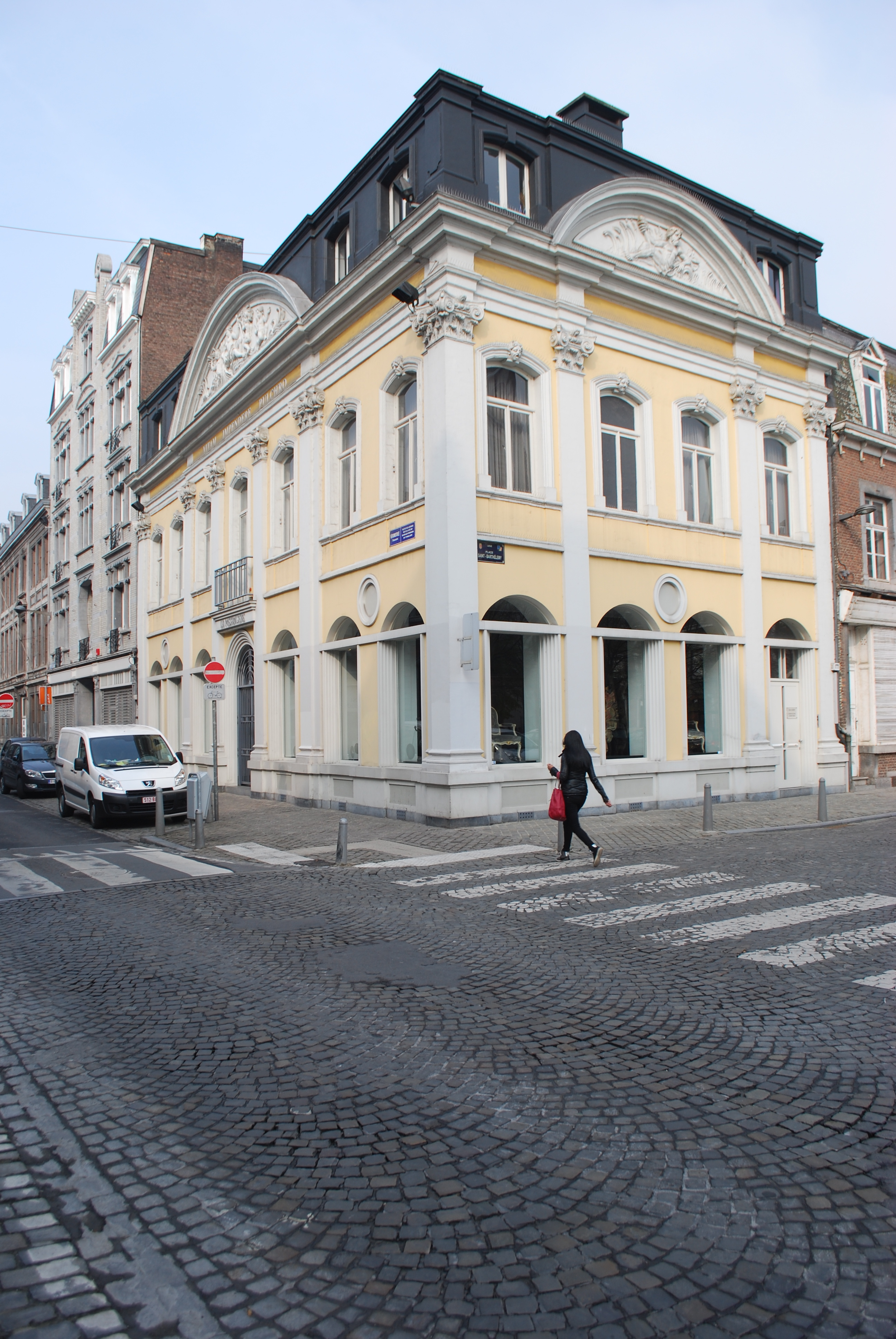 Vue de Feronstrée à Liège.